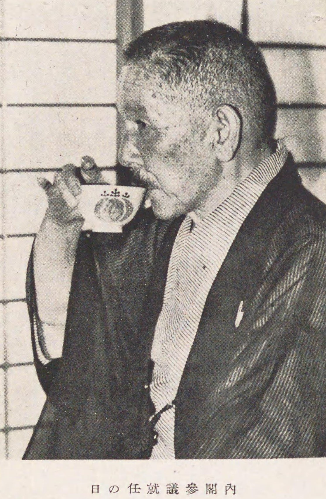 1940年2月13日内閣参議に就任する望月圭介